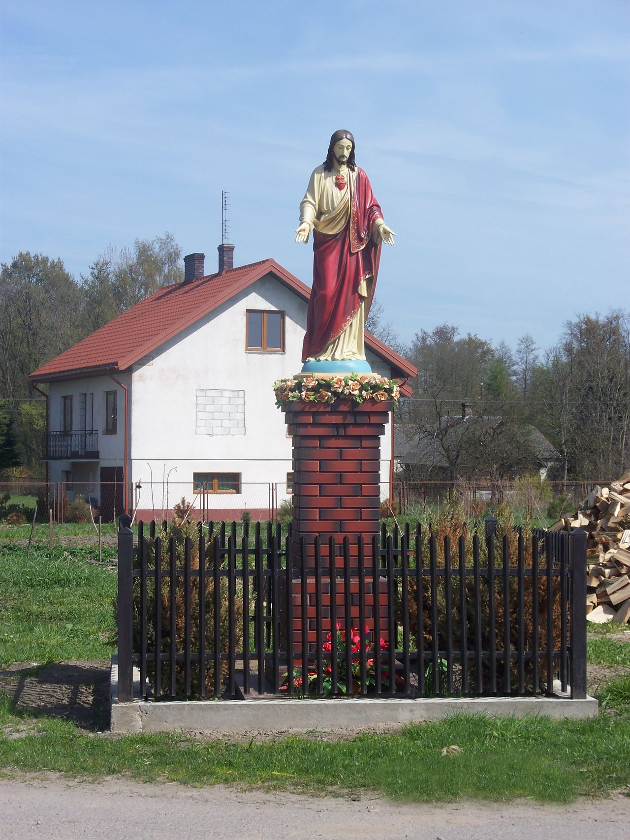 Figura ta stoi na wjeździe do miejscowości, wcześniejsza pochodziła z 1940 roku lecz przed kilkoma laty uległa zniszczeniu